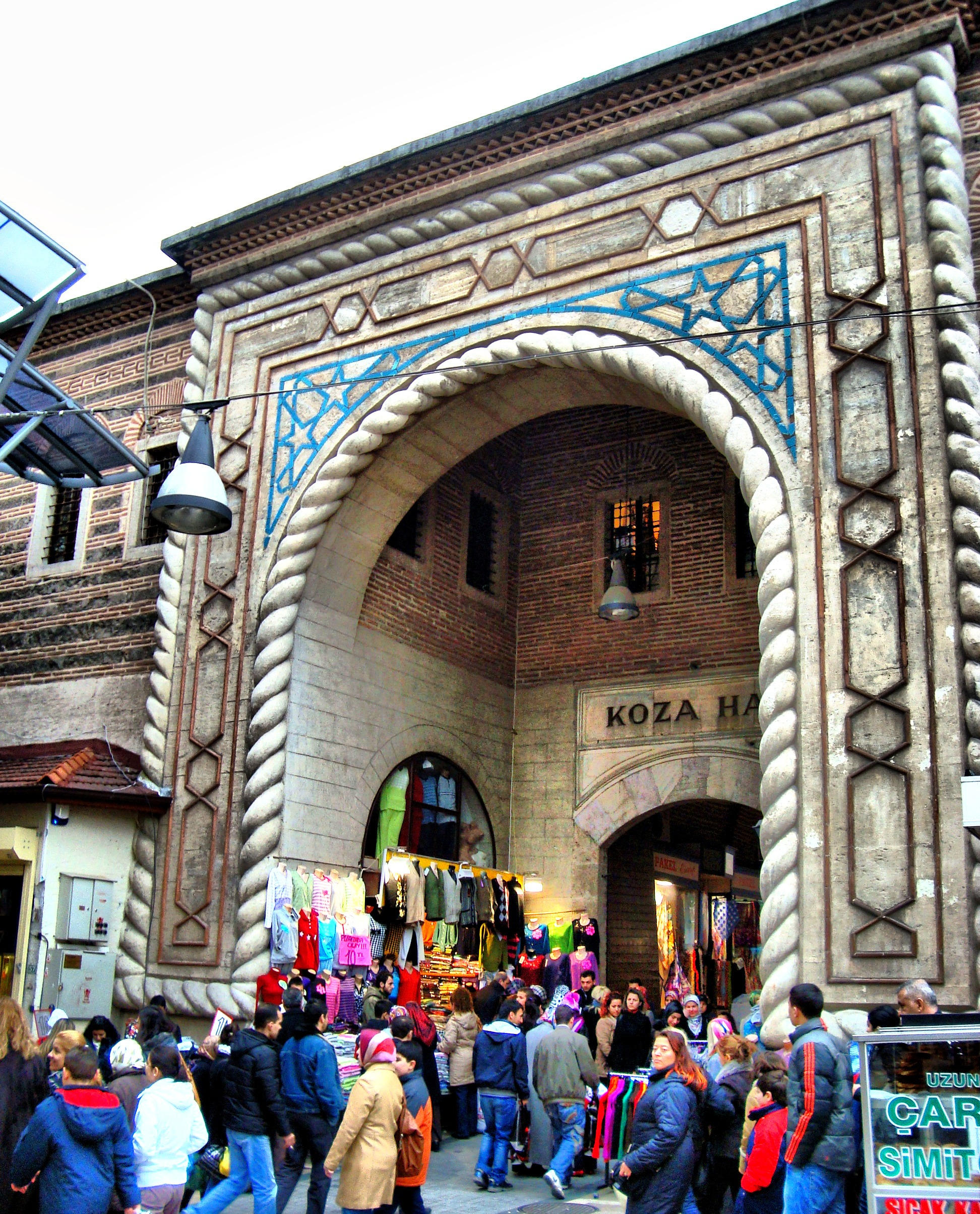 Kozahan -silk bazaar-Main gate